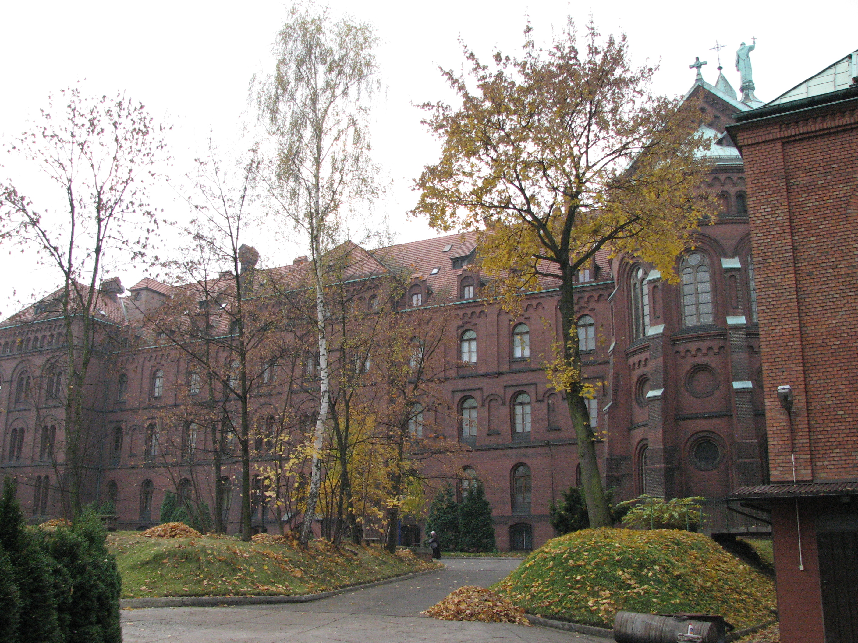 Franciscan monastery in Katowice Panewniki, Poland